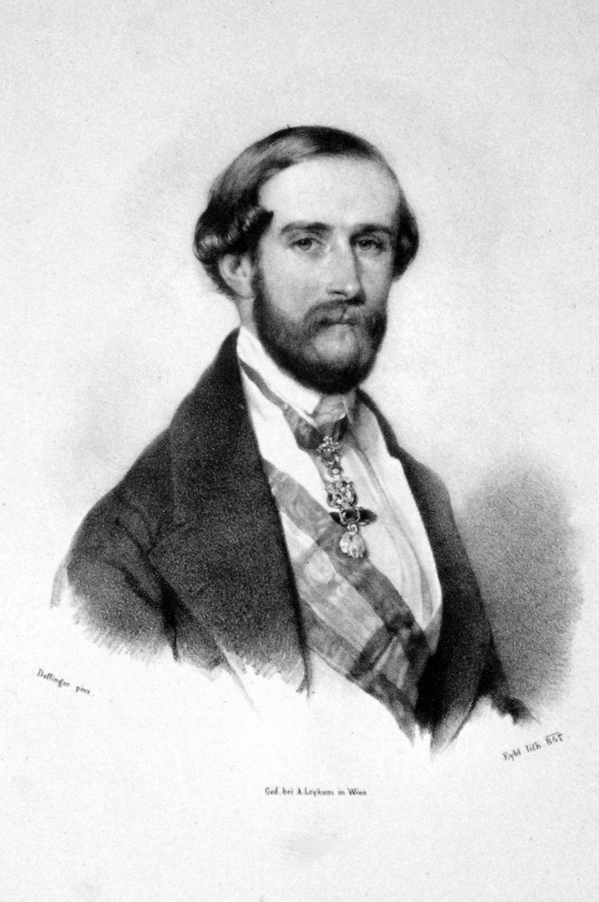 John Charles Bourbon, Graf von Montizon, Herzog von Madrid, Thronprätendent von Spanien. Lithographie von Franz Eybl, 1847: nach Daffinger